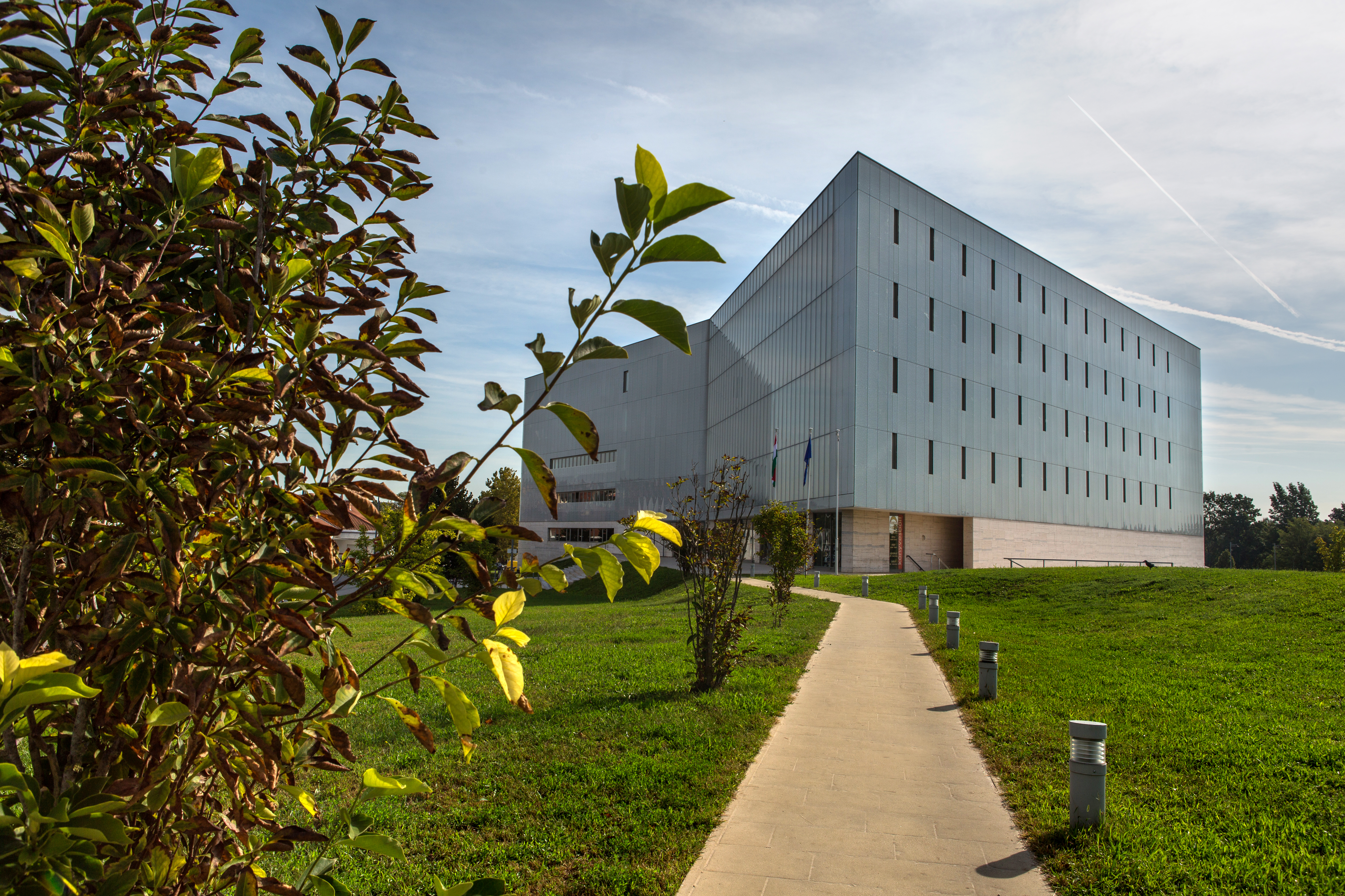 A Tudásközpont látképe (Pécs)